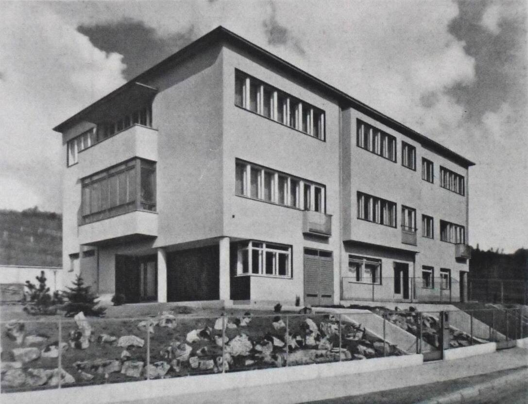 původní foto z konce 30. let 20. století